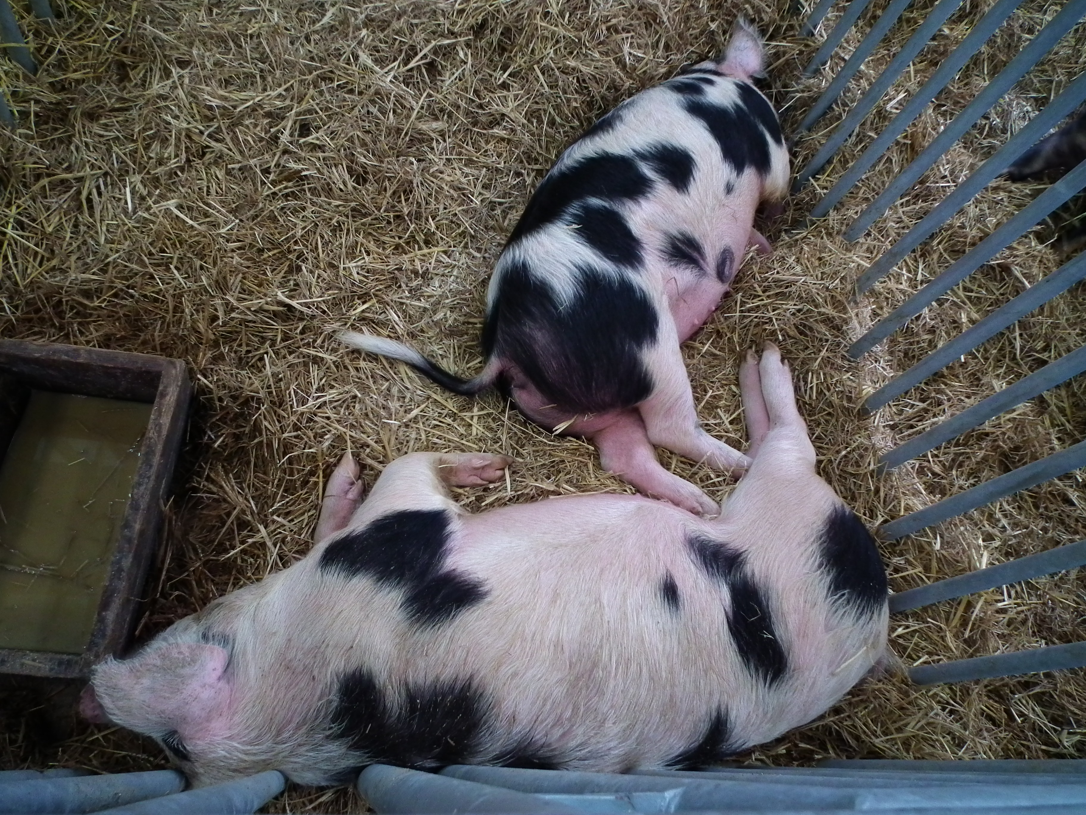 Świnia rasy złotnickiej pstrej.